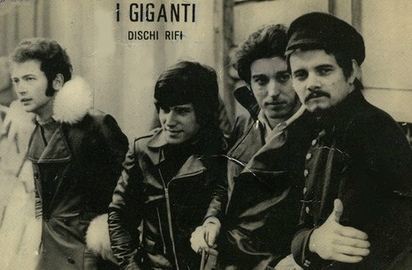 I gruppo dei Giganti Cartolina promozionale d'epoca - 1964 - Dischi RiFi Giganti